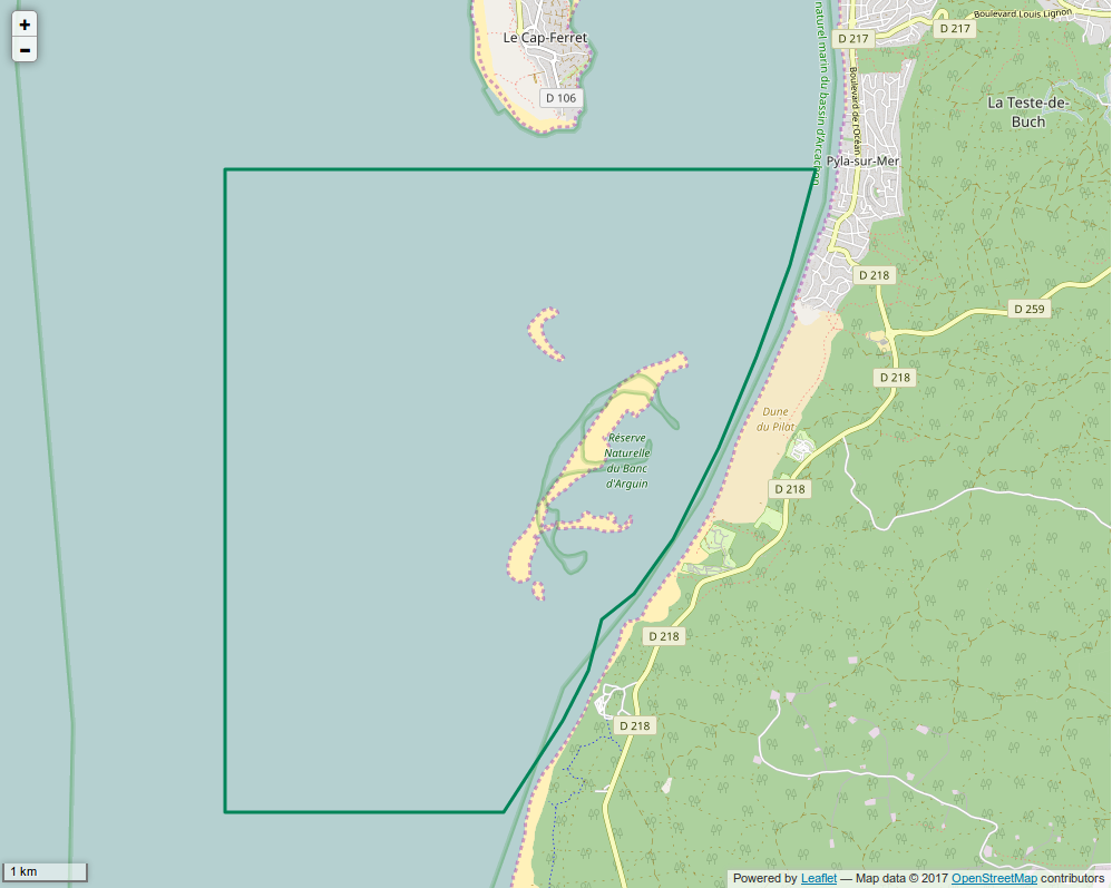 Périmètre de la RNN du Banc d'Arguin après le décret d'extension du 10 mai 2017.